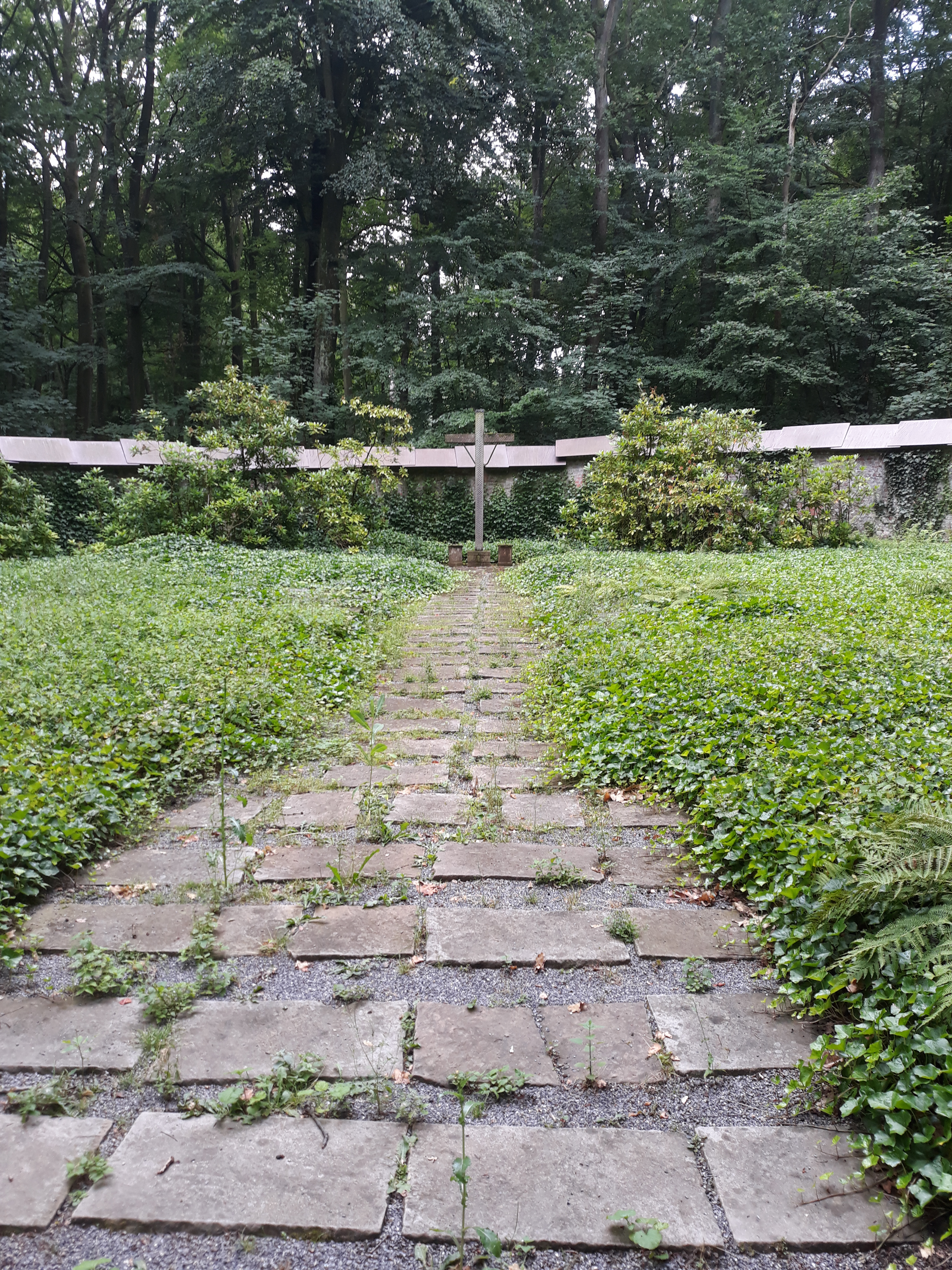 Das Familiengrab der Freiherren von Vincke im Fleyer Wald in Hagen-Boele. Begraben liegen hier auch der westfälische Oberpräsident Ludwig von Vincke und der Reichstagsabgeordnete Georg von Vincke.